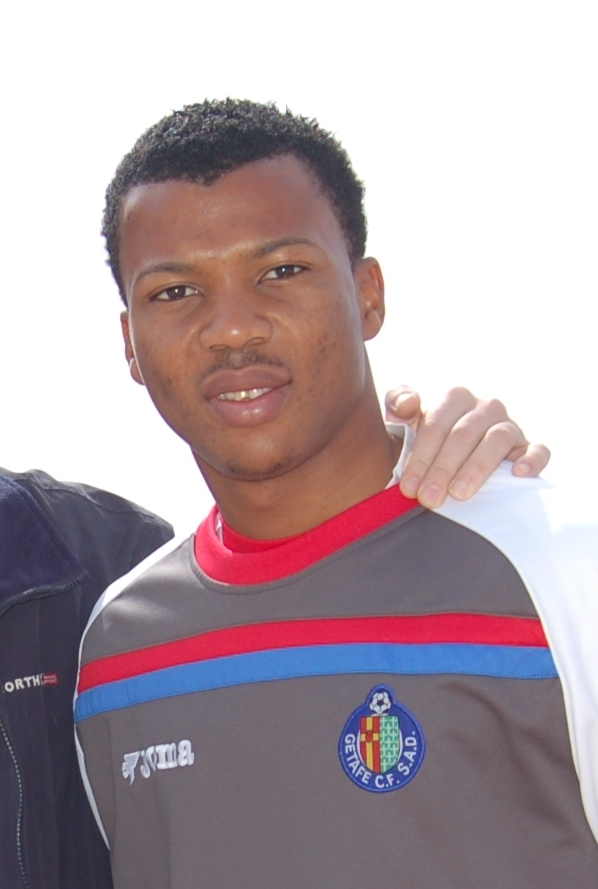 Ikechukwu Uche. Futbolista de Nigeria.